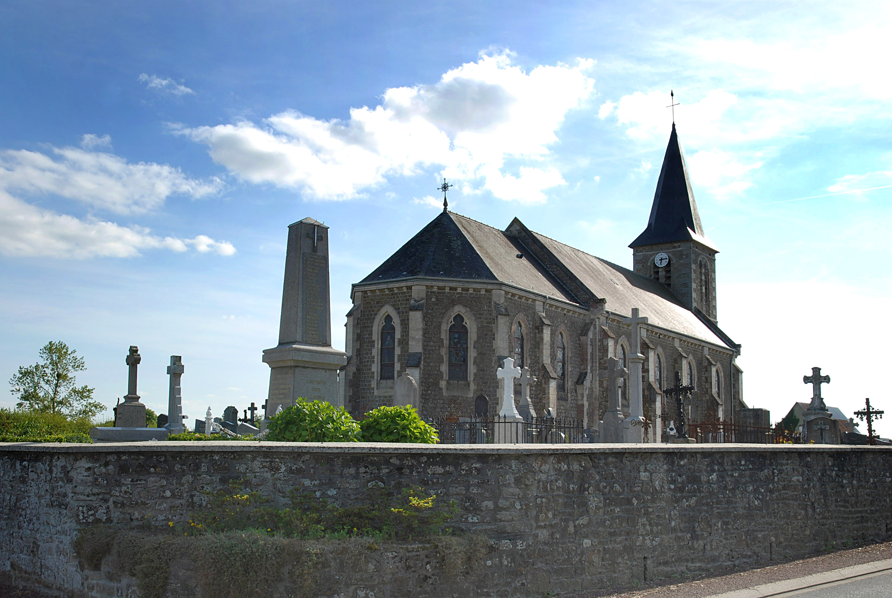 Giéville (Manche)